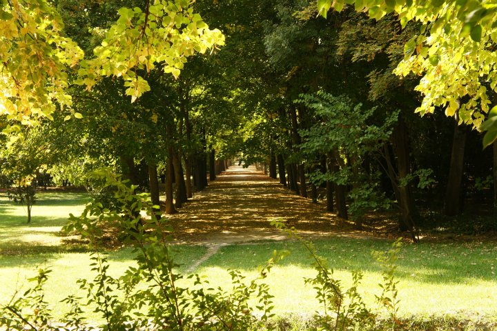 Un agradable paseo otoñal por los Reales Jardines de Aranjuez